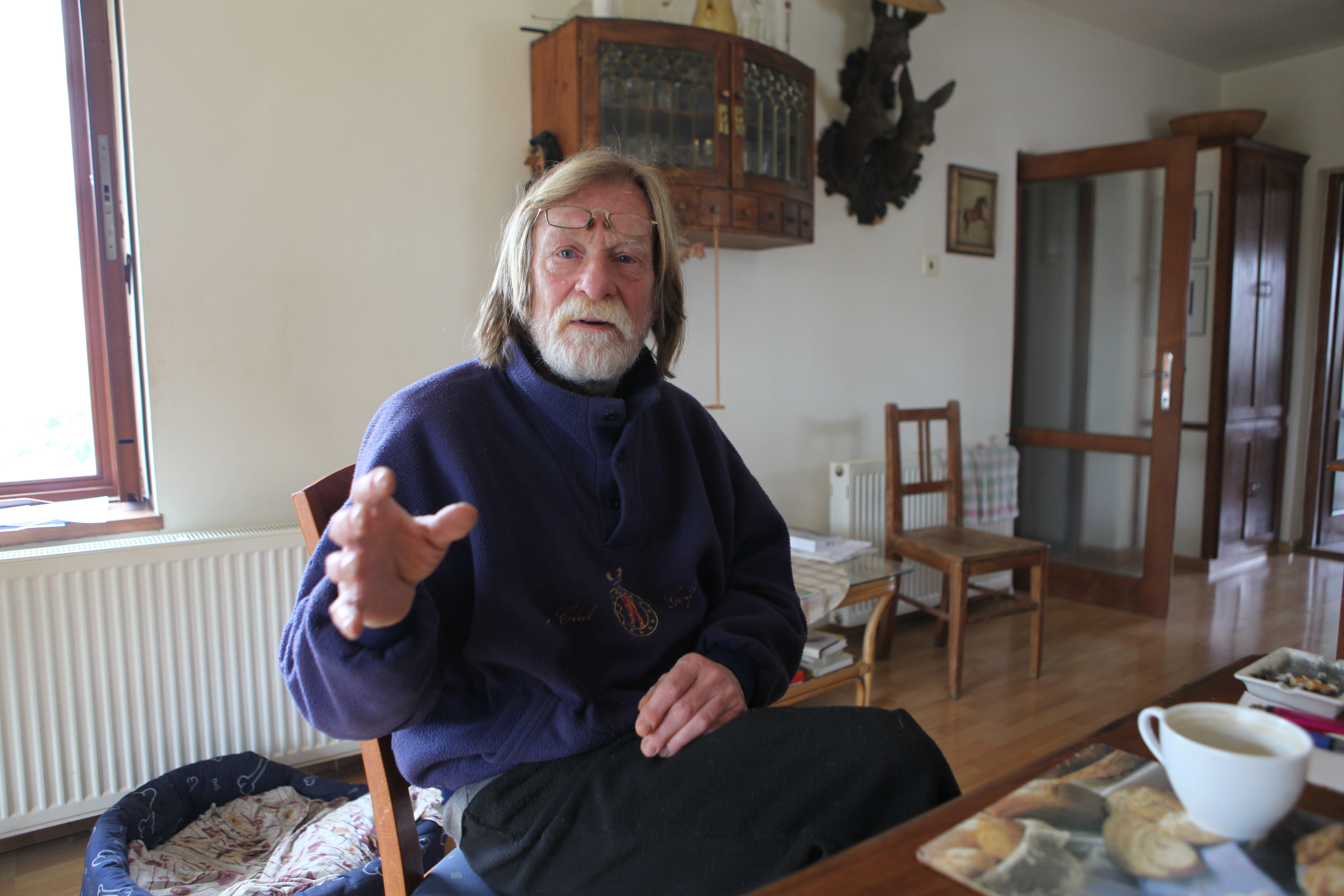 František Provazník ve svém ateliéru.